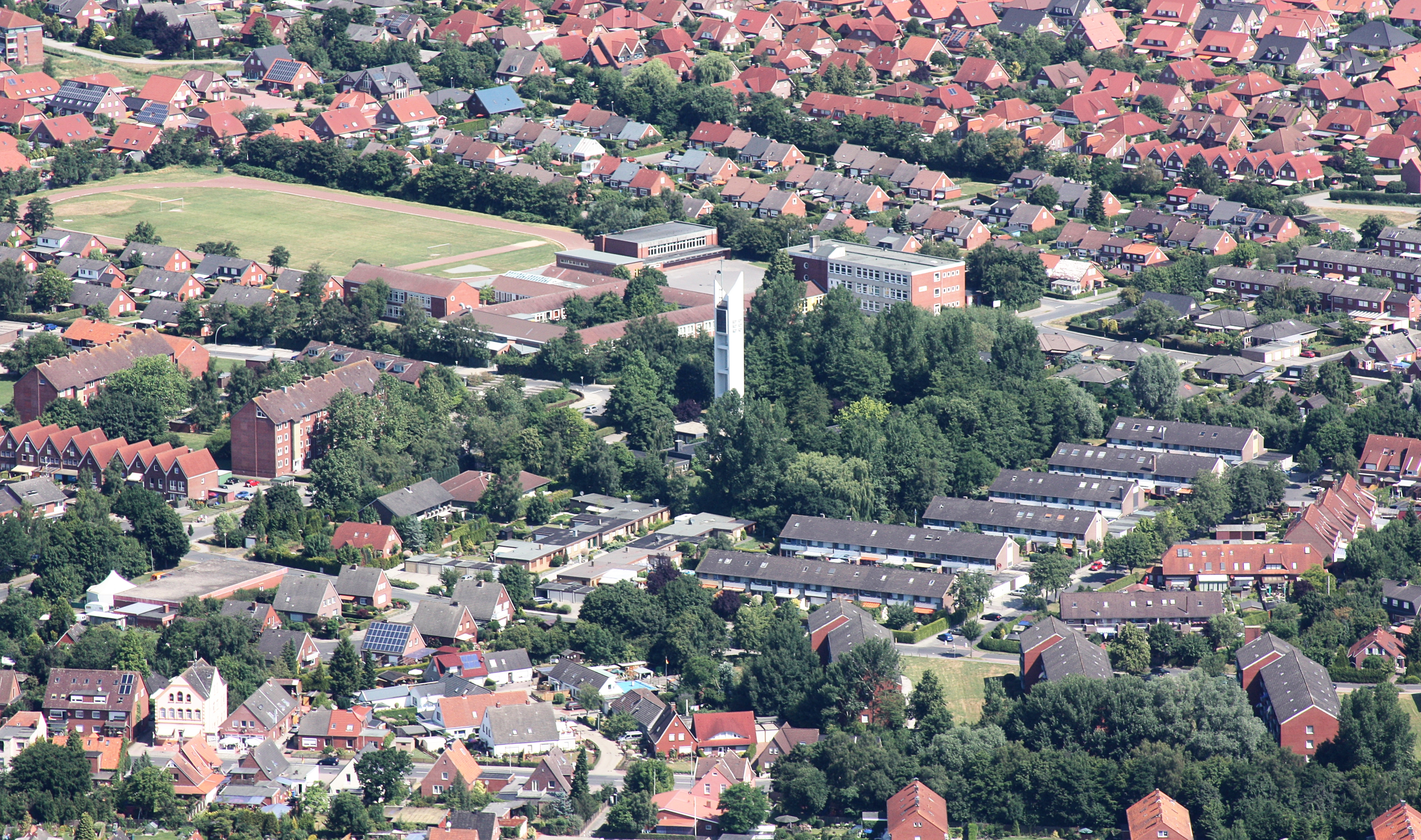 Flug über Emden; Flughöhe 1500 ft; Juli 2010; Originalfoto bearbeitet: Tonwertkorrektur und Bild geschärft mit Hochpassfilter